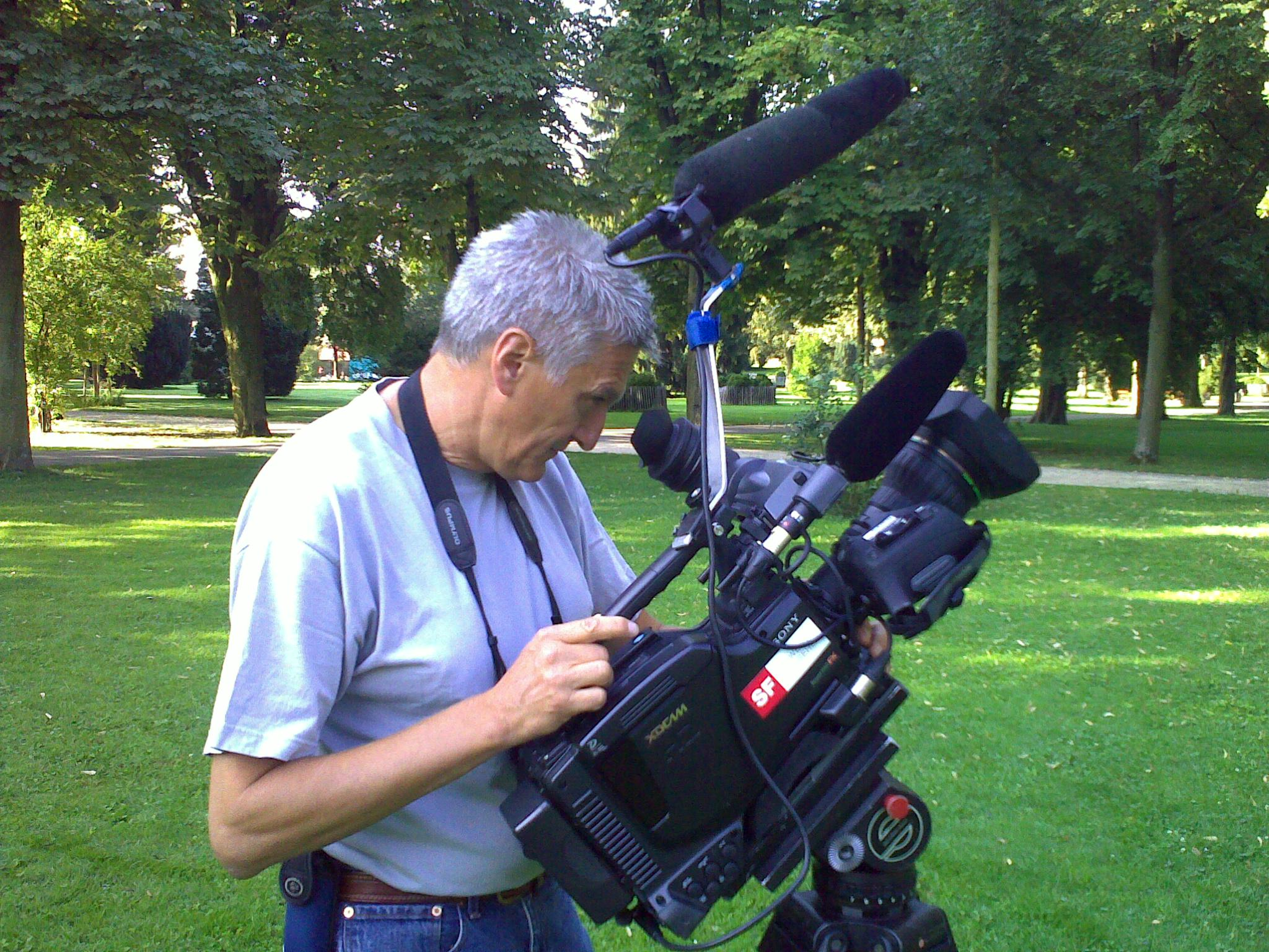 Zuf�llig! ist er heute grad im Kannenfeldpark am Drehen f�r einen Film �ber Eichh�rnchen.